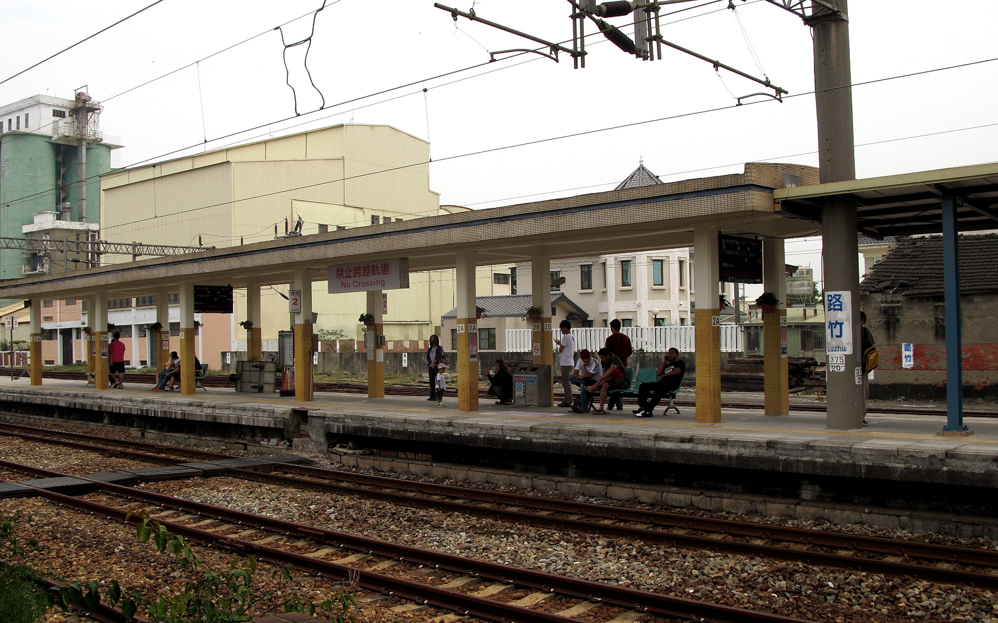 路竹火車站